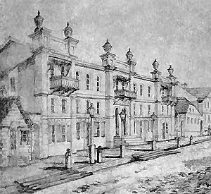 Гатэль Ромера ў Гародні (вул. Савецкая 23) паводле малюнка Н. Орды